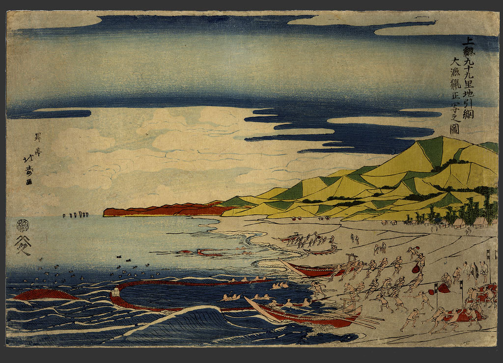 Esquisse réelle d'une bonne pêche dans la pêche au filet de dragage sur la plage de Kujukuri dans la province de Kazusa Actual Sketch of A Good Catch in Drag-Net Fishing at Kujukuri Beach in Kazusa Province — 上総九十九里地引網大漁猟正写之図 Shotei Hokuju 1810's